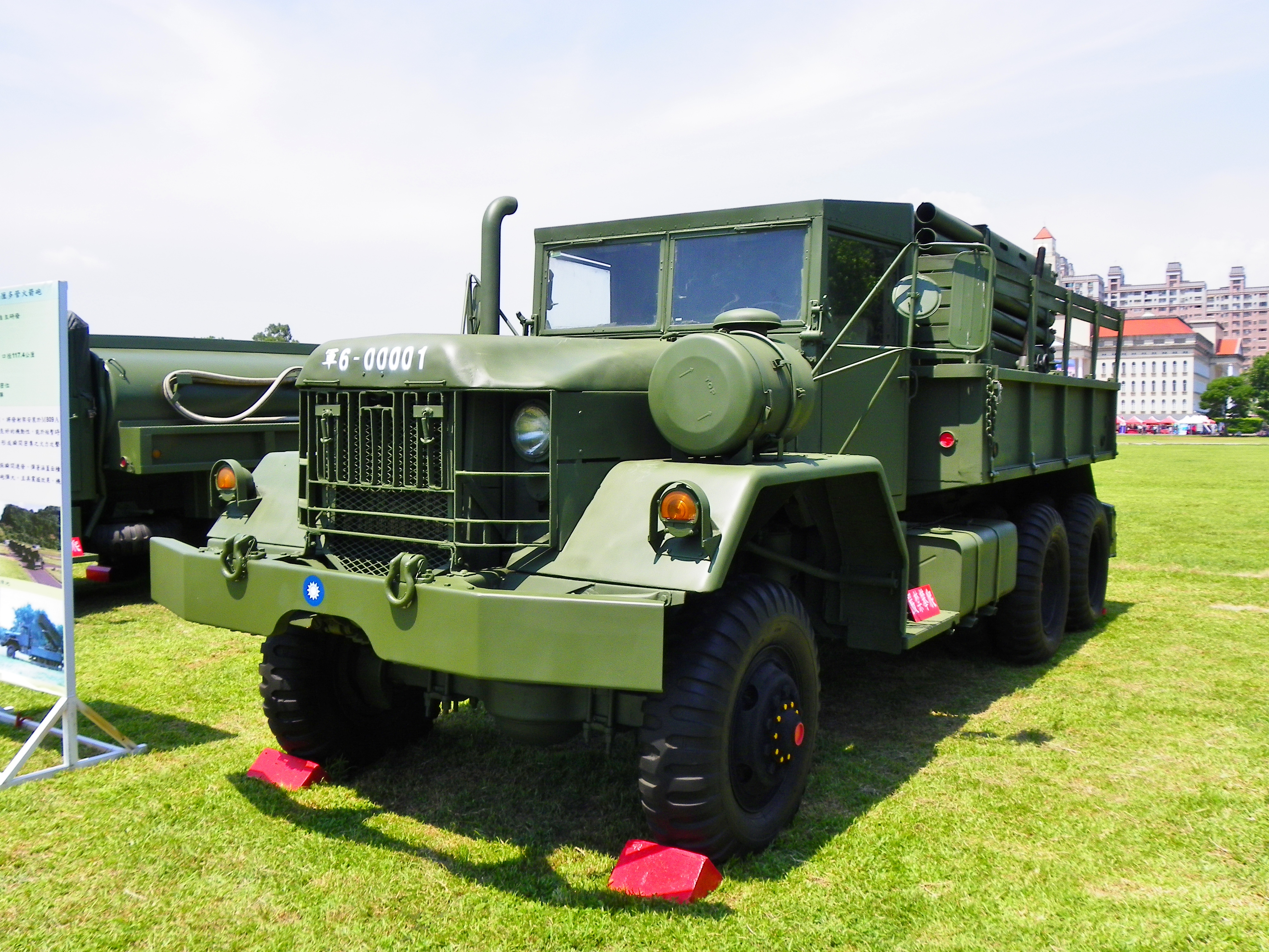 2014年陸軍官校營區開放活動，操場展示之工蜂六型多管火箭系統左前方。